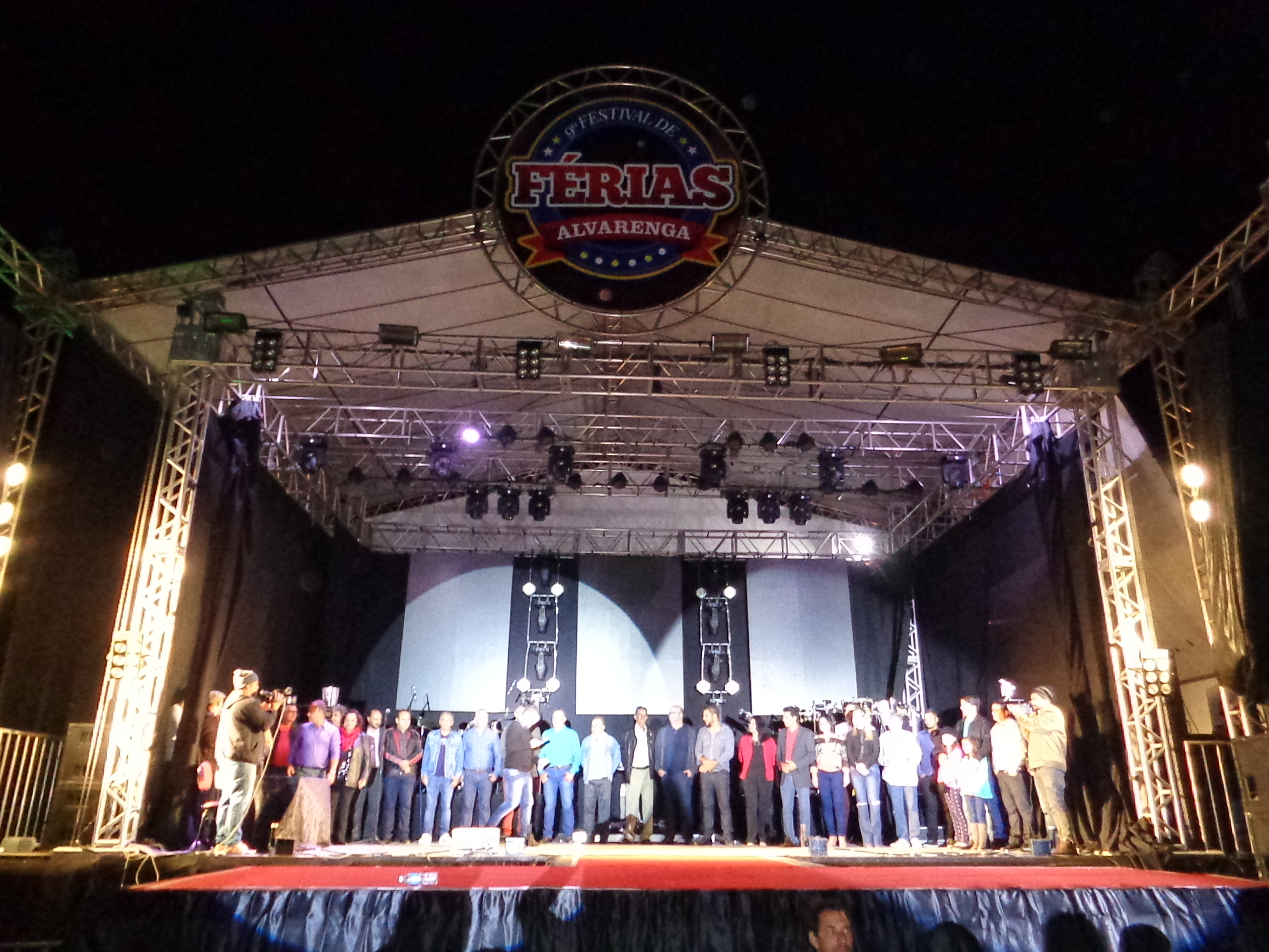 Festival de Férias de Alvarenga, em Minas Gerais, Brasil.